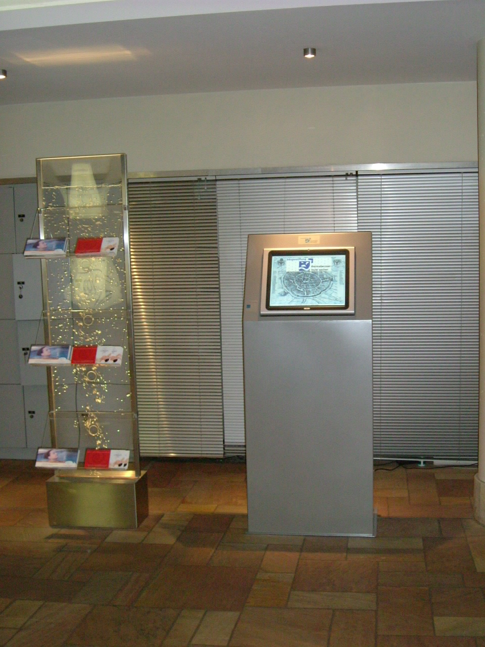 Interaktive Informationssäule über die Thermalquellen und die Bädergeschichte in Aachen